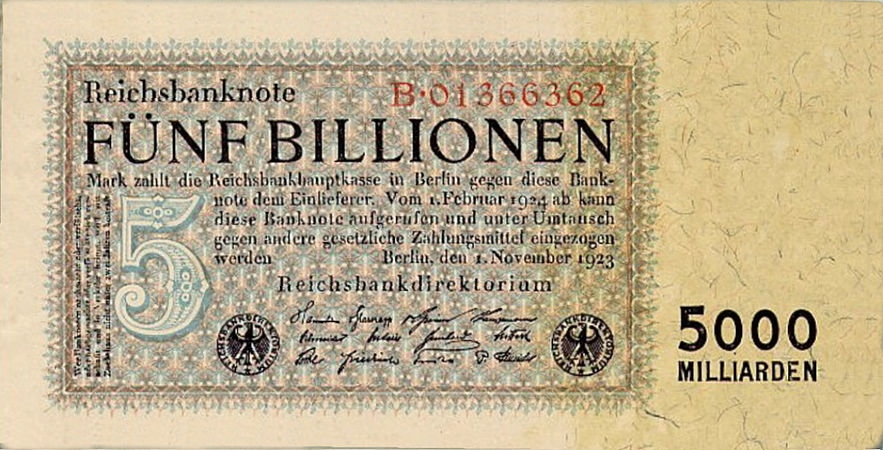 Reichbanknote fünf Billionen Mark, 1923